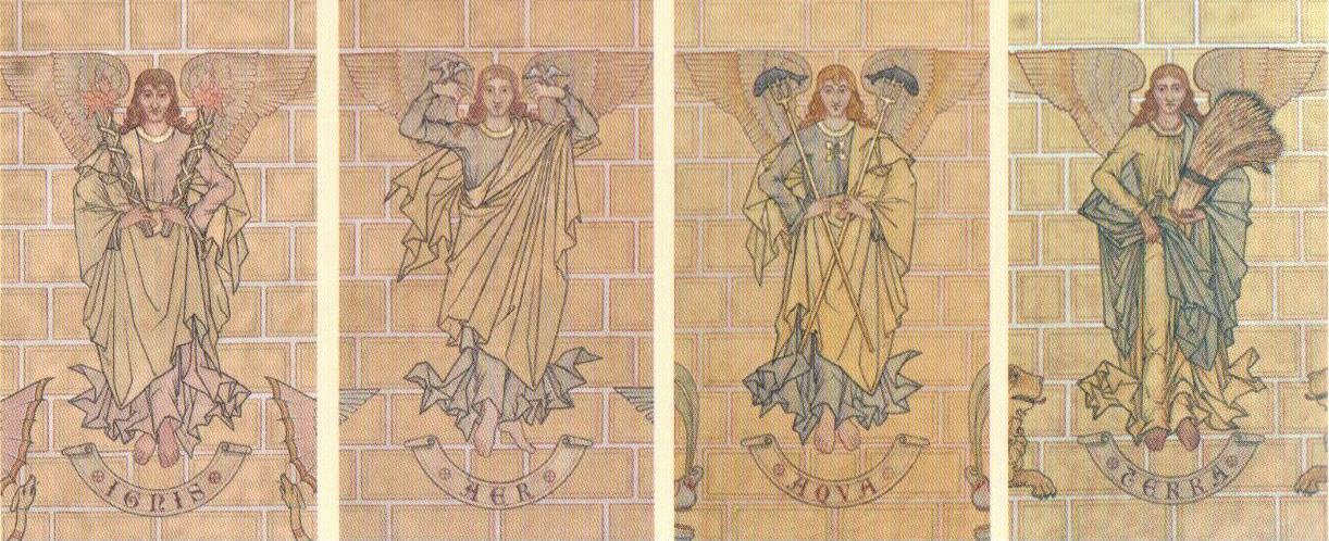 Kaiserdom Königslutter, Obergaden, Die vier Elemente: Ignis (Feuer), Aer (Luft), Aqua (Wasser), Terra (Erde)